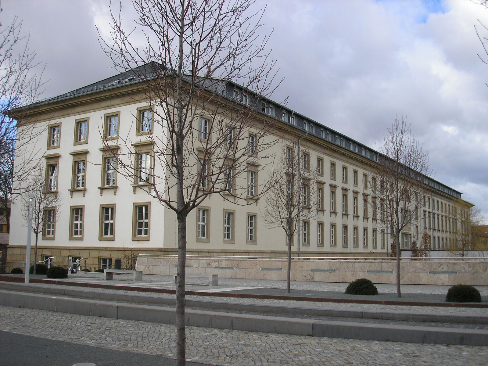 Rückansicht des Bürogebäudes des Thüringer Landtags in Erfurt.